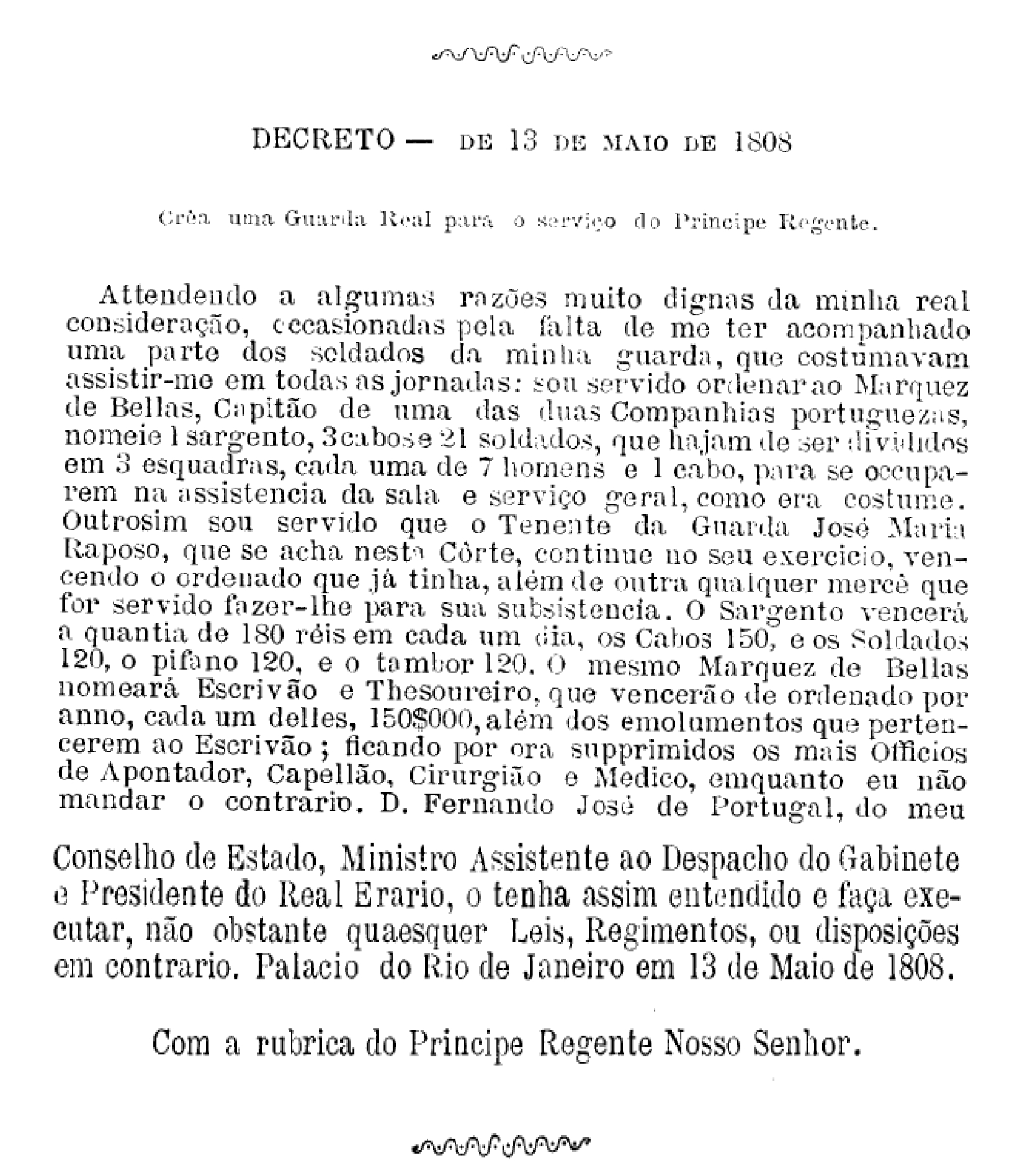 Decreto de criação dos Dragões da Independência assinado por Dom João VI em 1808.